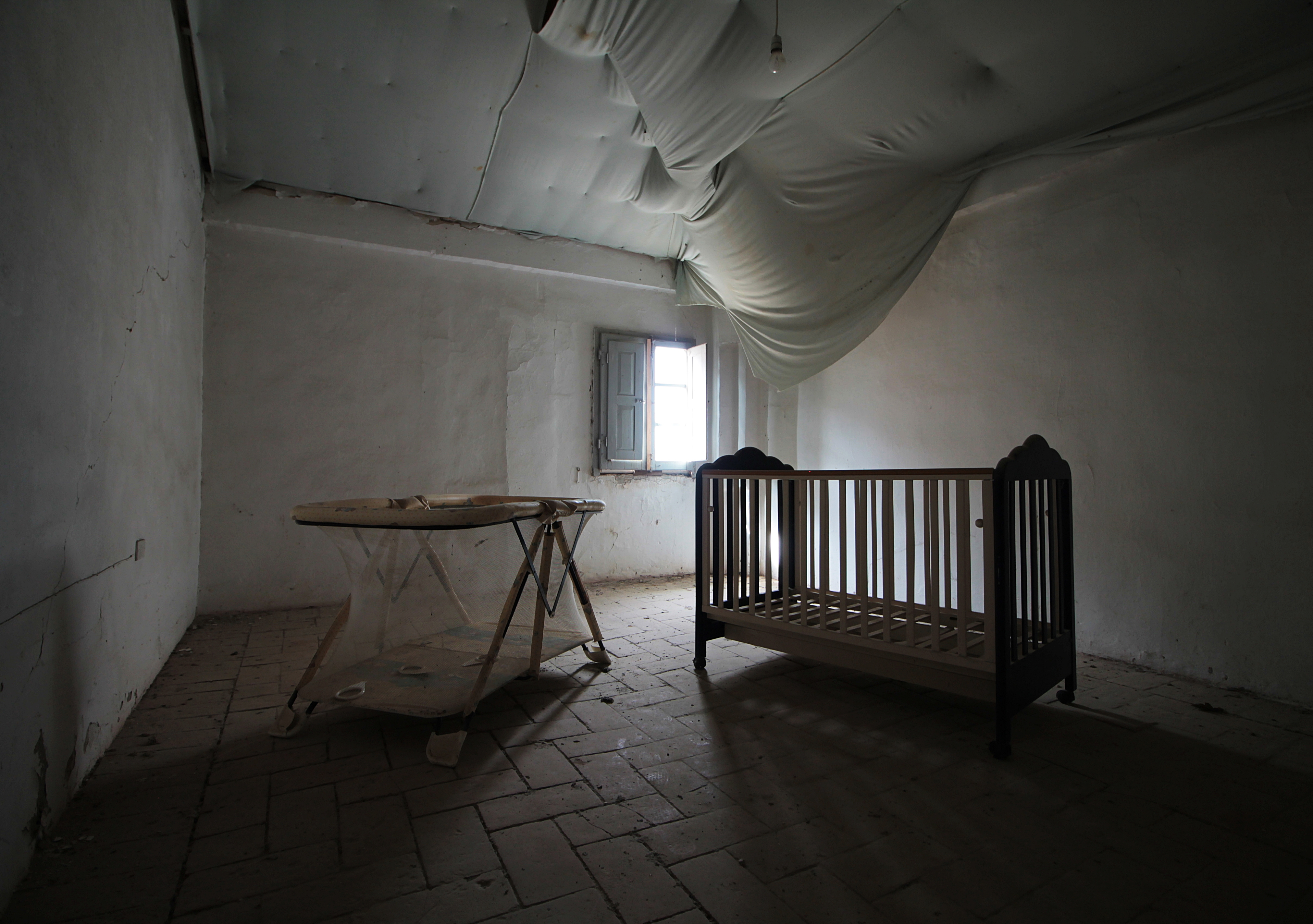 Una camera dei bambini in una casa abbandonata